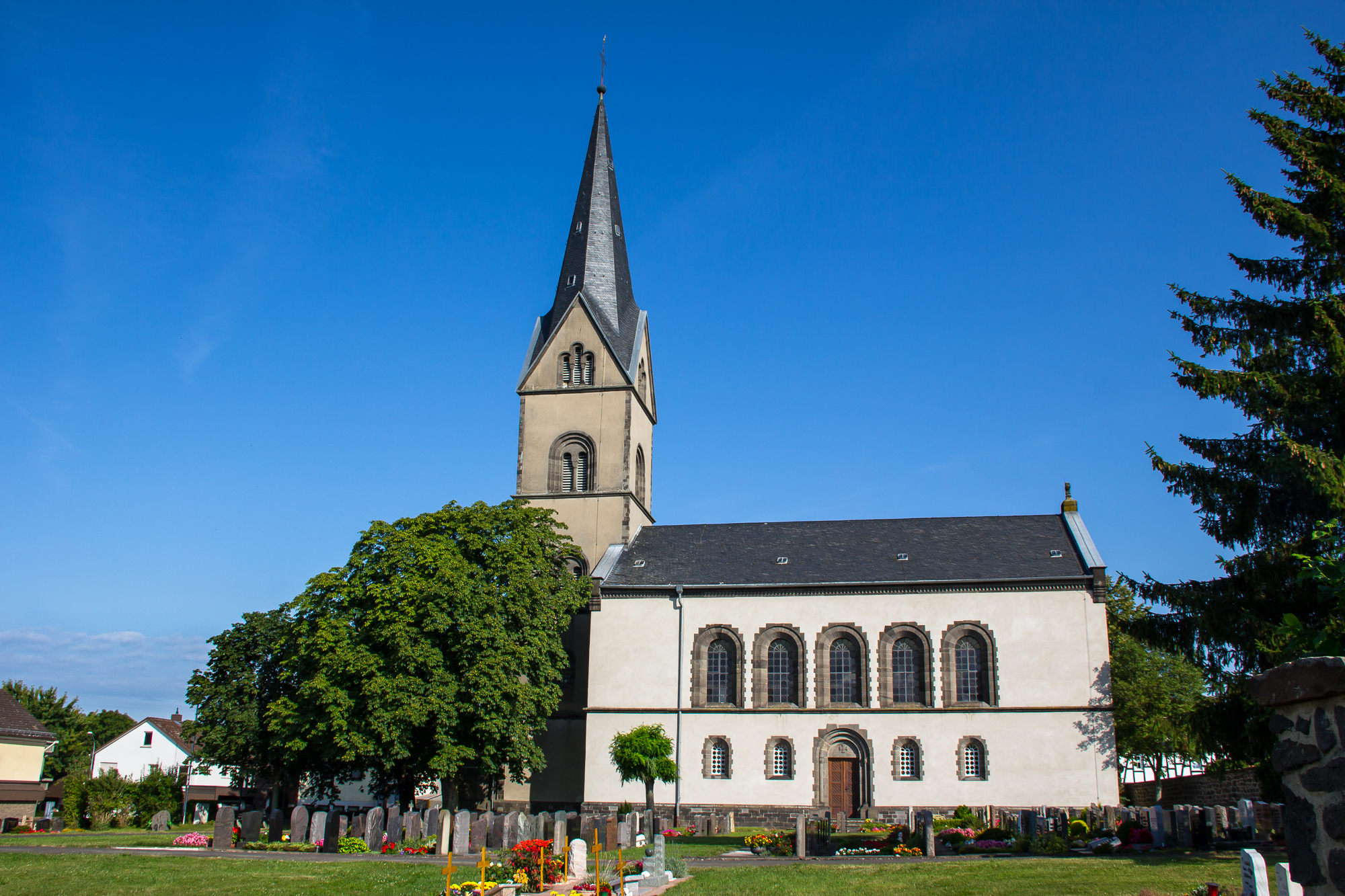 Evangelische Kirche Steinbach, Gemeinde Fernwald, Landkreis Gießen in Hessen, Deutschland